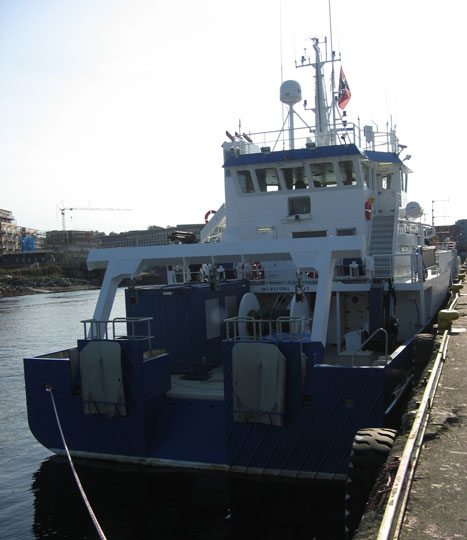 Norwegian resarch vessel